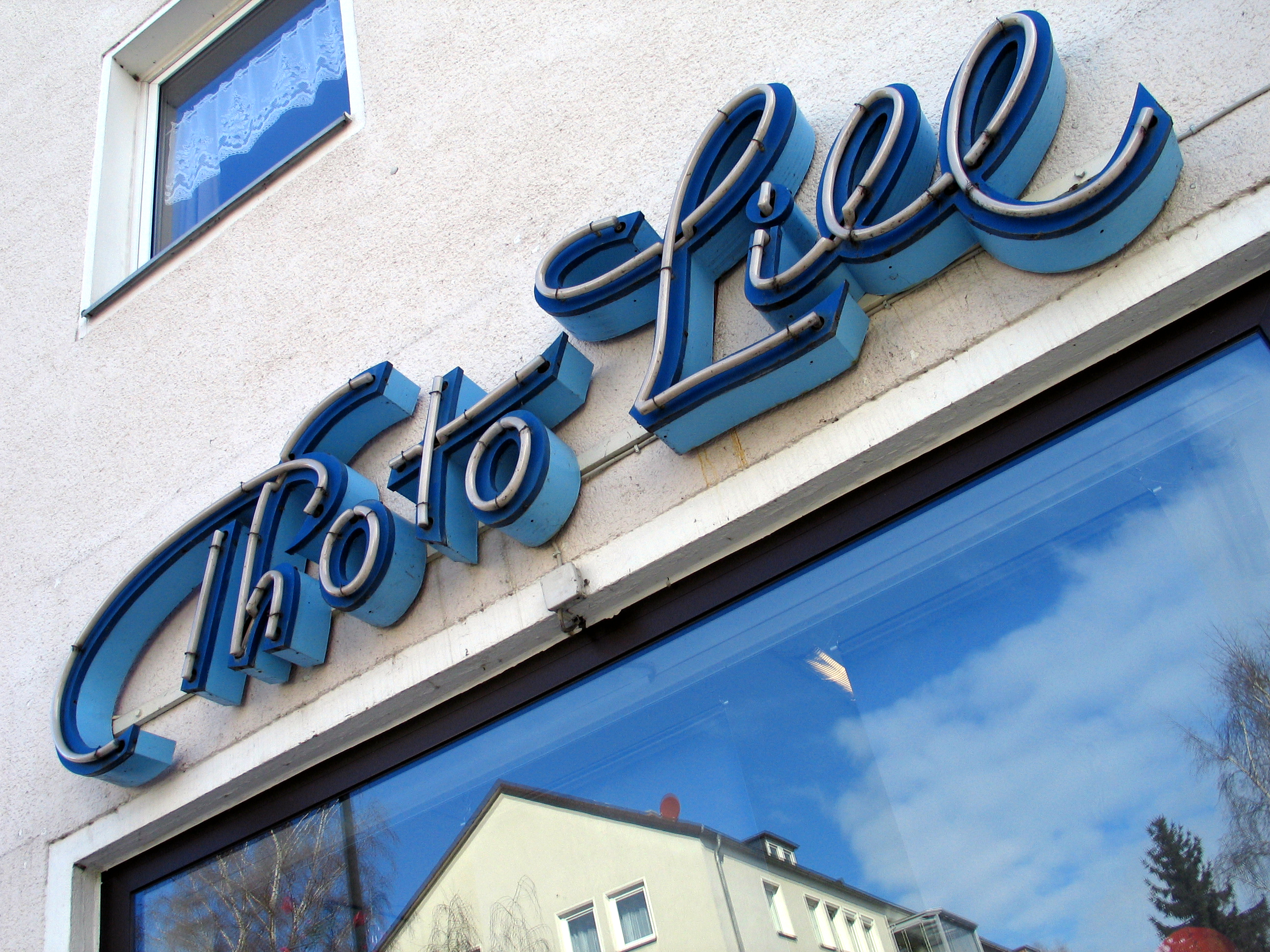 Neonröhren-Leuchtschrift Photo Lill unter der Adresse Werderstraße 3 Ecke Wörthstraße ...